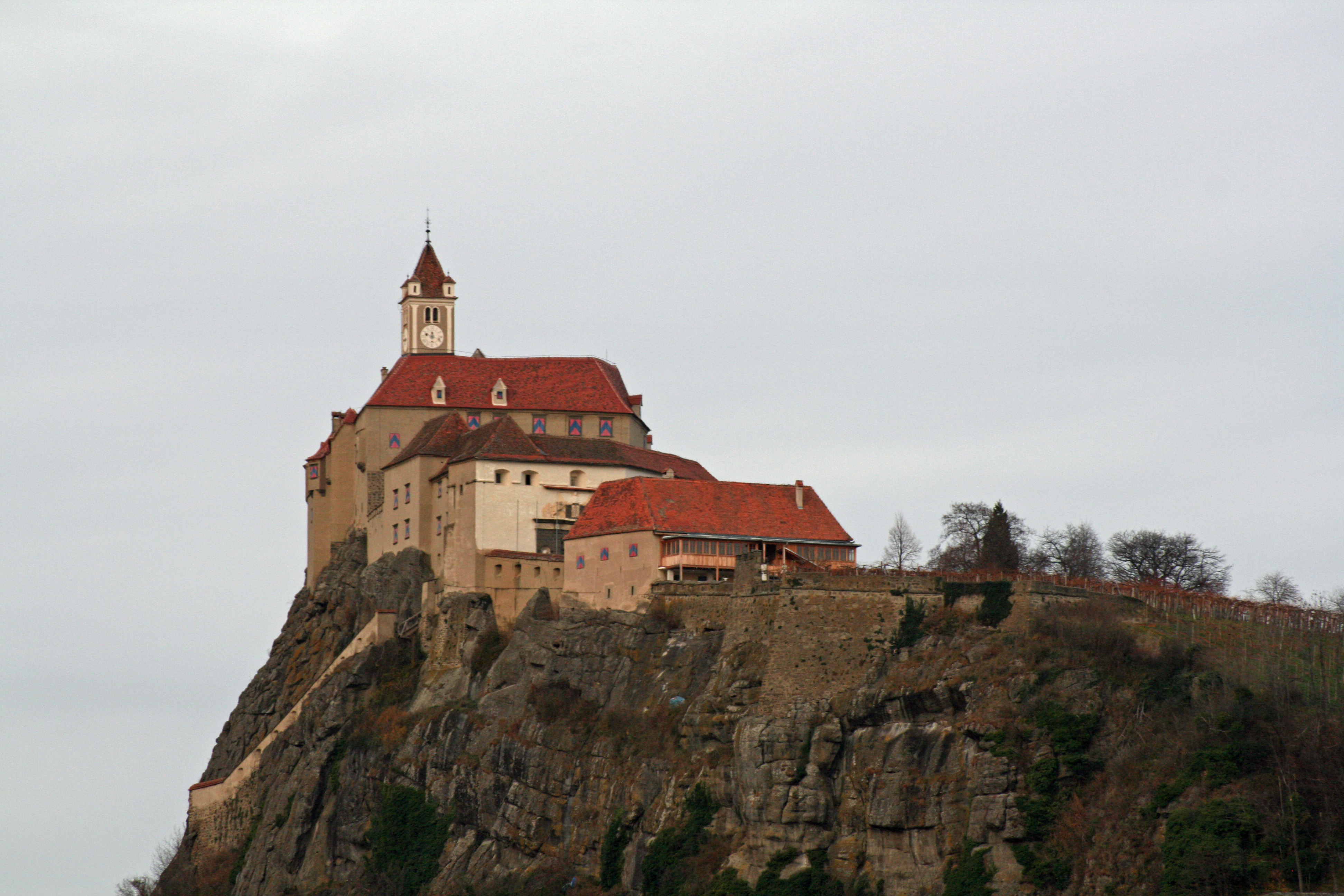 Riegersburg, Steiermark, Austria